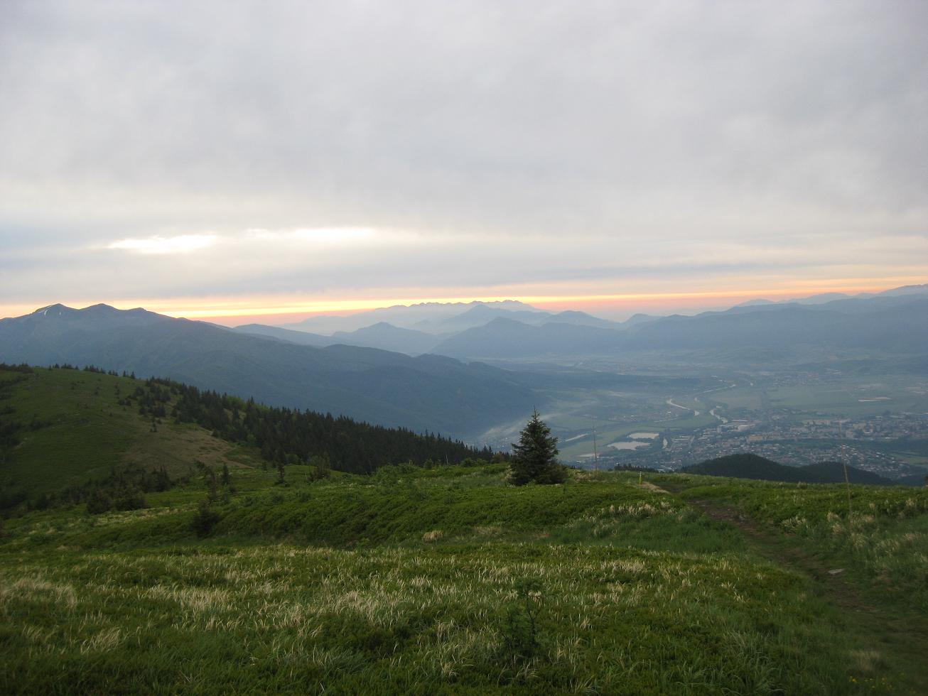 Výhľad z Minčola na východ